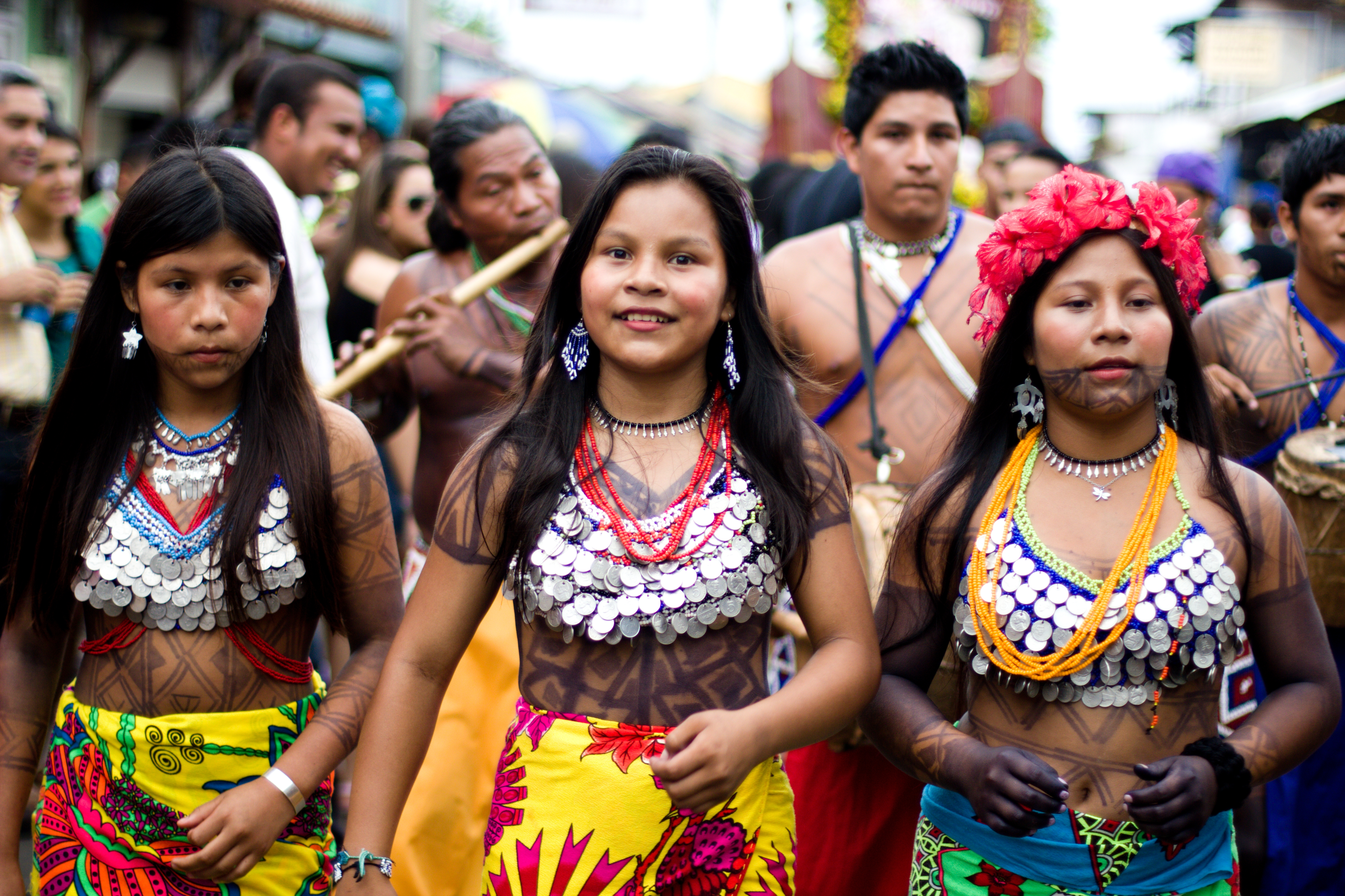 Mujeres de la etnia Emberá en desfile celebrado en Chitré, capital de la provincia de Herrera, Panamá.